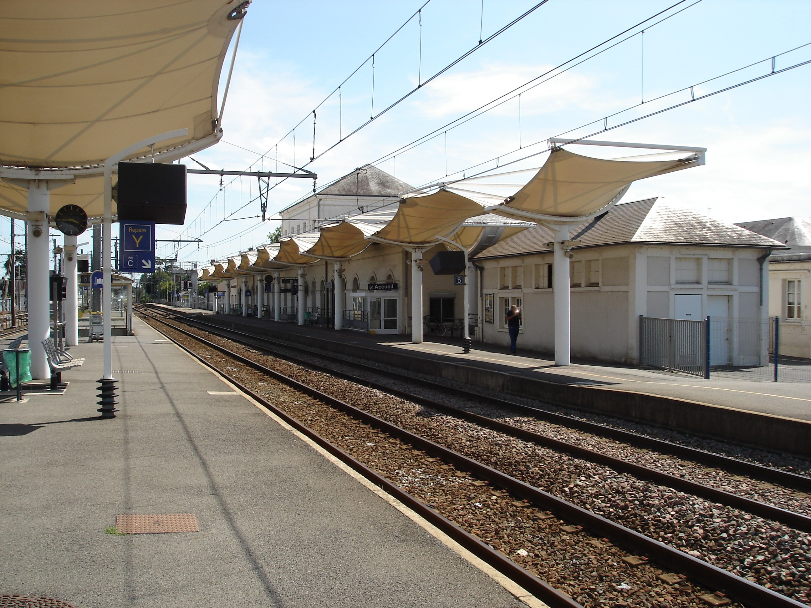 Gare de Châtellerault (86) : Les quais central, latéral et le bâtiment voyageurs.